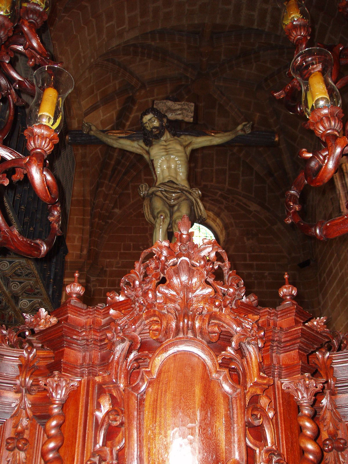 Cristo de la Misericordia en El Puerto de Santa María.